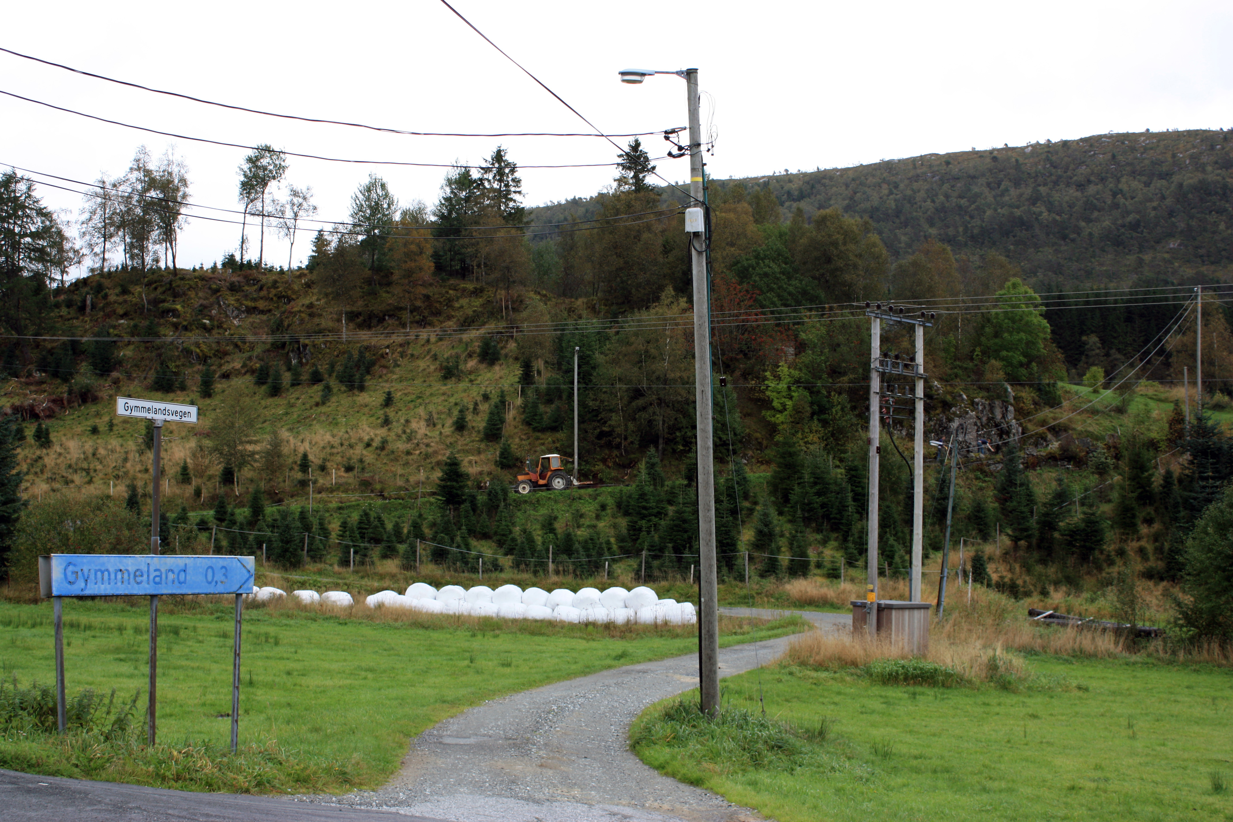 Gimmeland, Fana, Bergen.